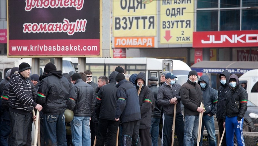 точка збору тітушок в Кривому Розі